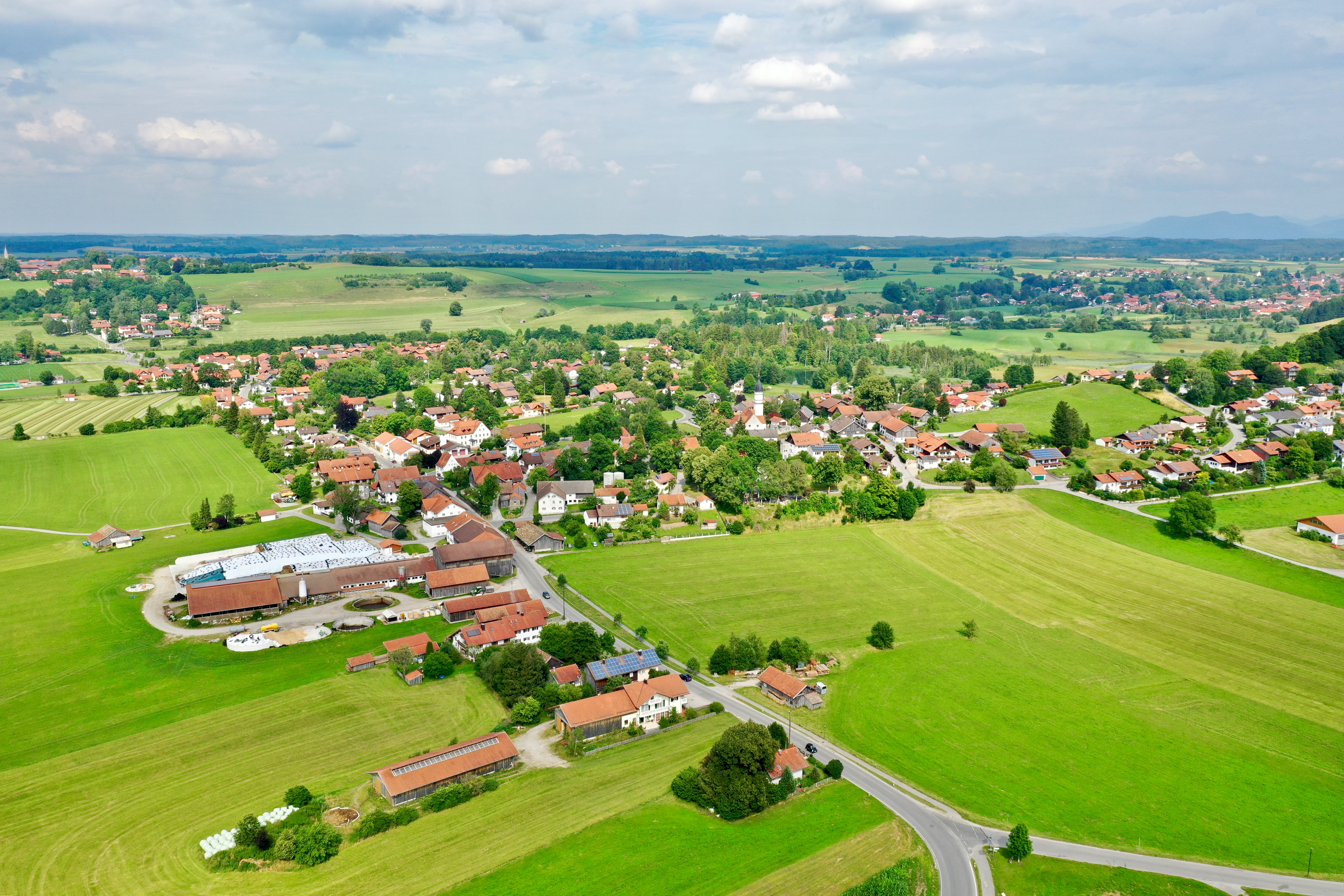 Oberhausen aus der Luft gesehen.